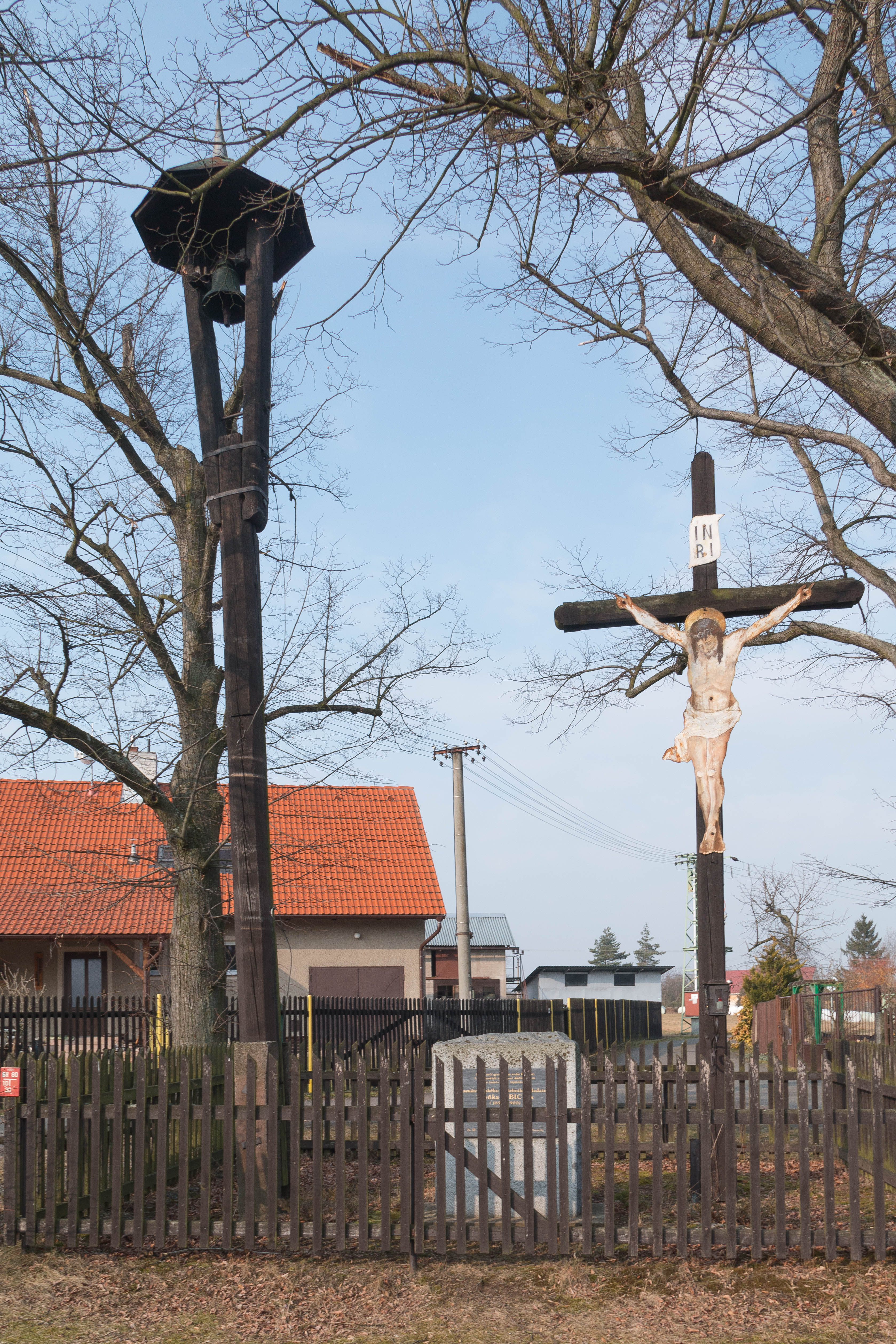 Libáň zvonička a kříž